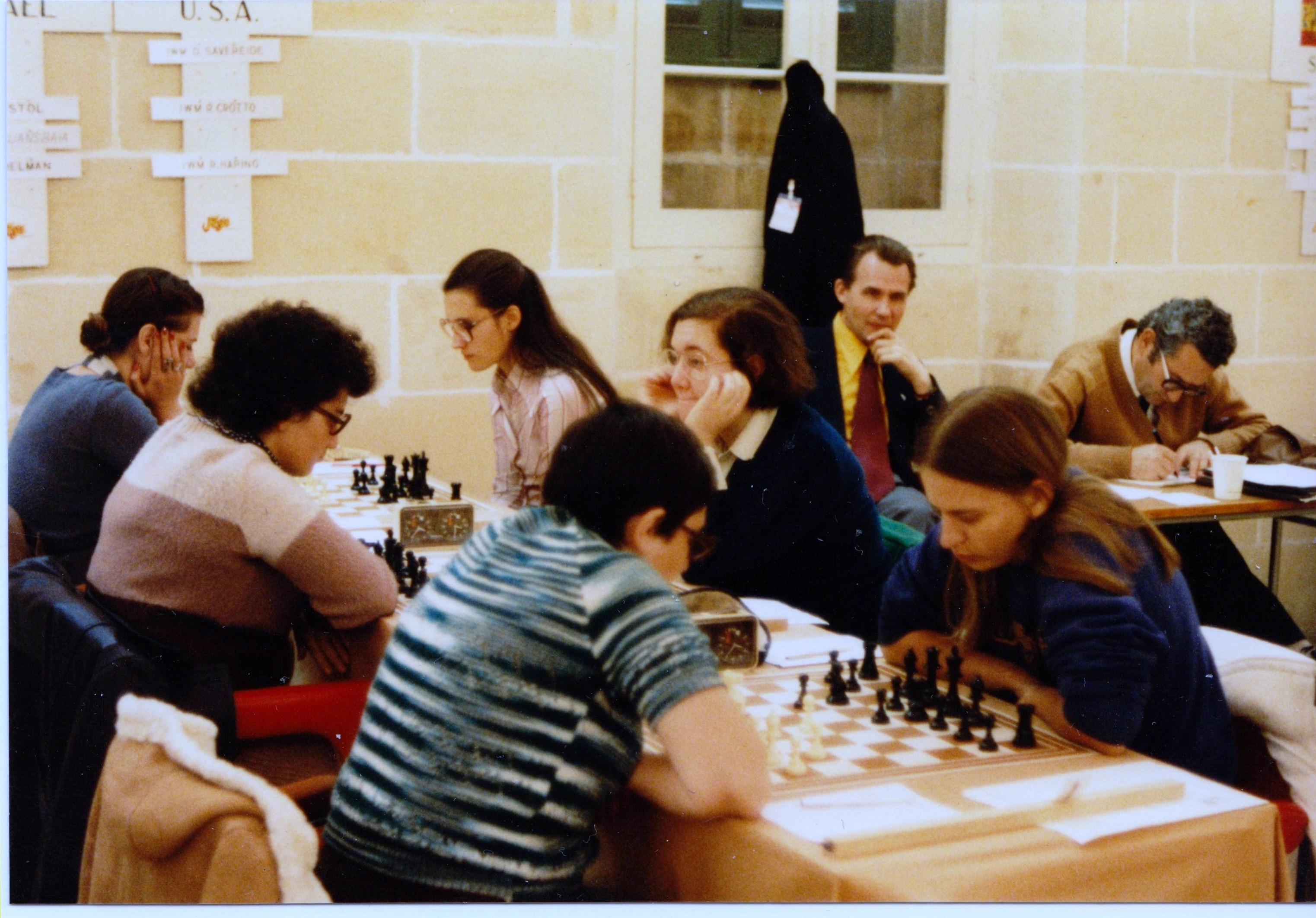 Israel - USA (Haring, Crotto, Savereide), 10. Runde am 30. November 1980, Schacholympiade 1980 auf Malta.